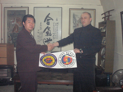 ENGANADO E O ENGANADOR.